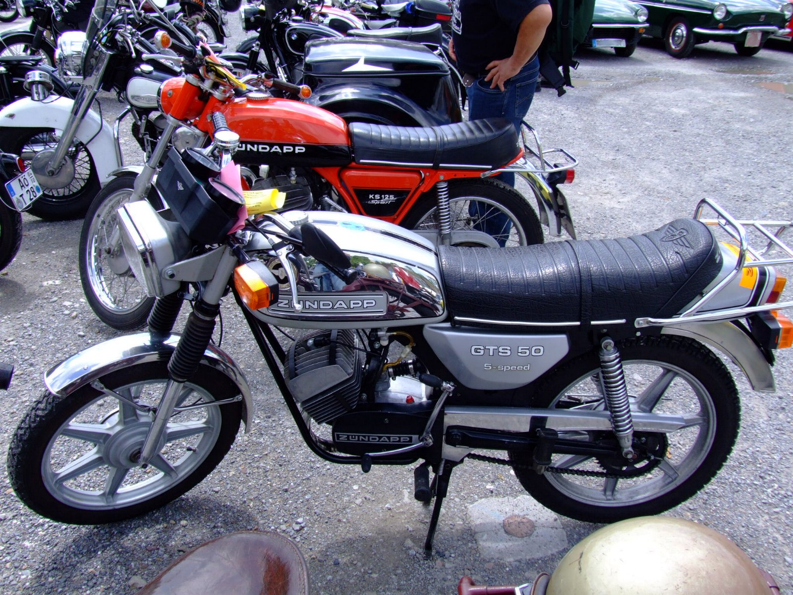 Gewicht: 175 kg